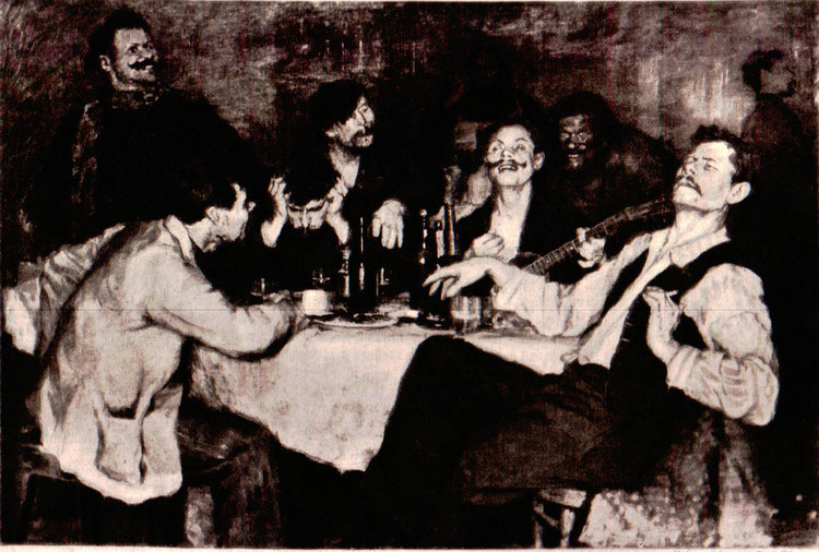 Картина "Товарищи"